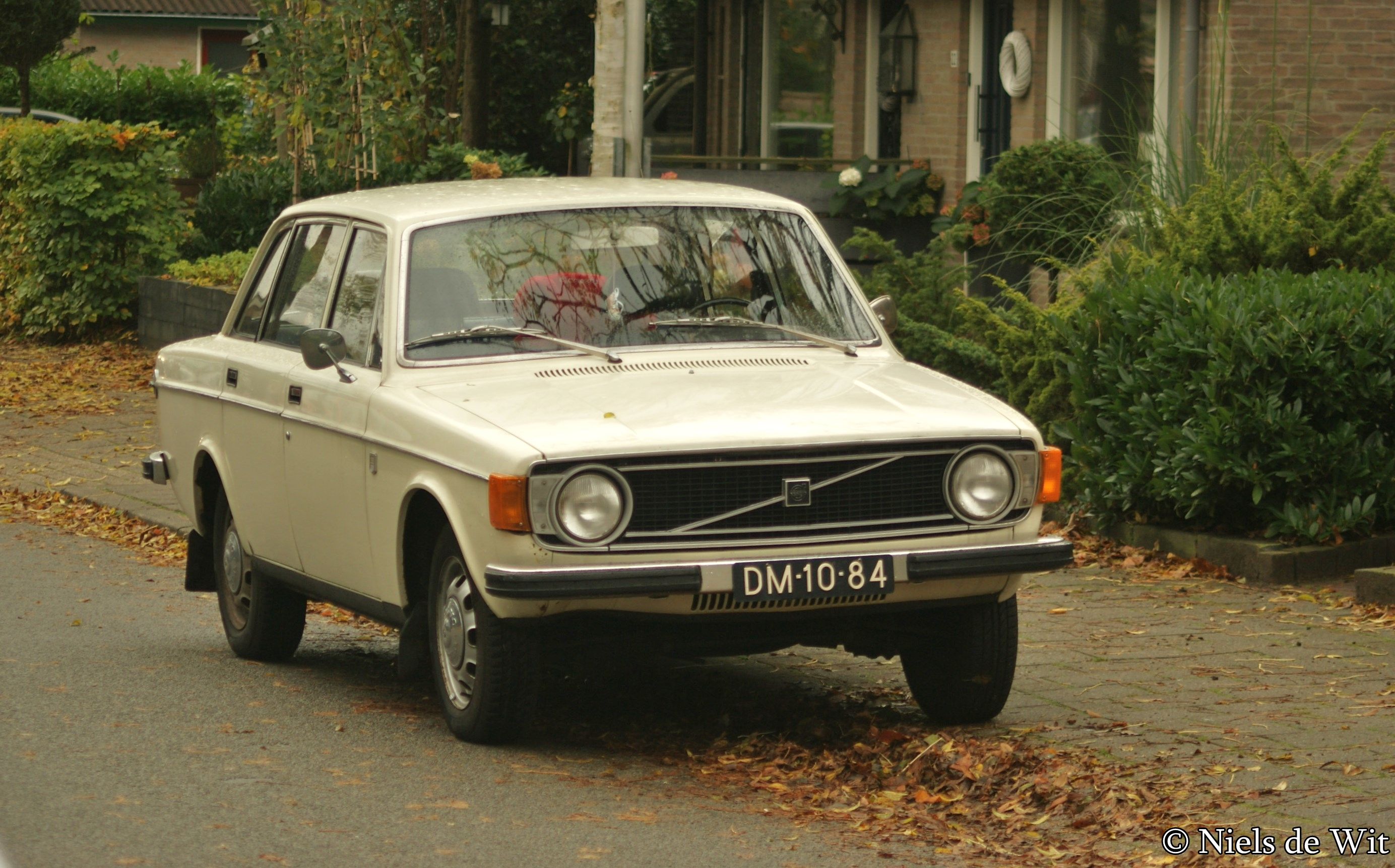 DM-10-84